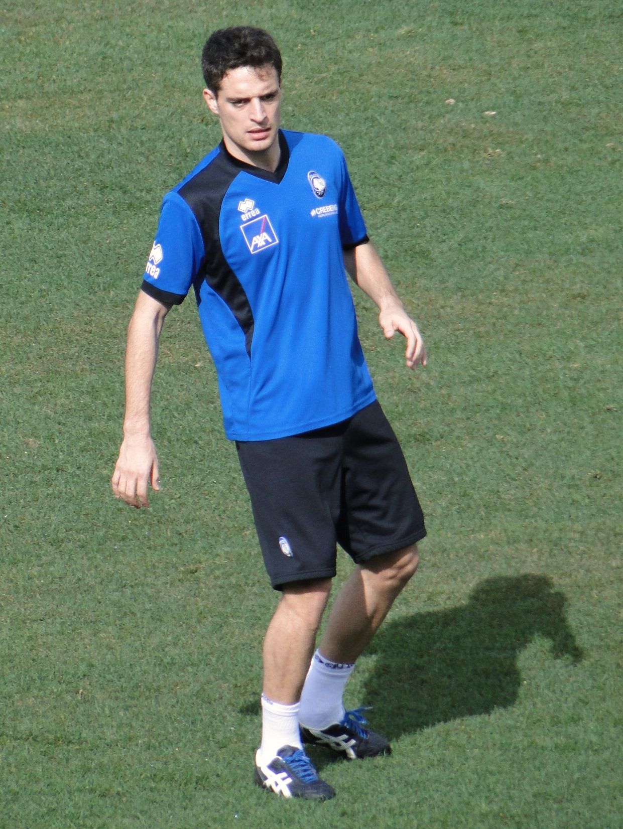 Giacomo Bonaventura, calciatore italiano